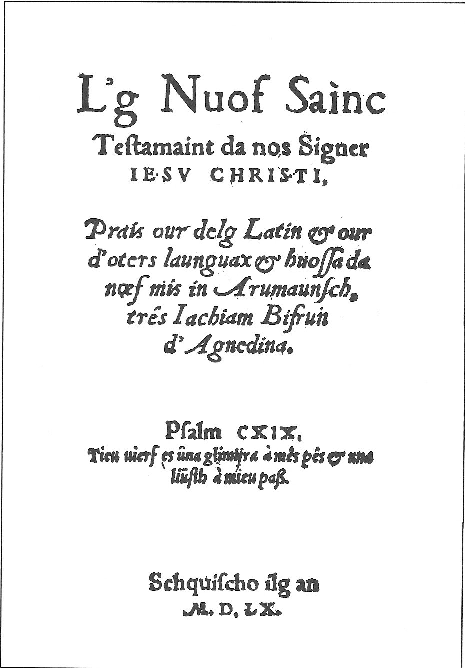 Titelblatt der Bibelübersetzung auf Rätoromanisch von J. Bifruns von 1560.